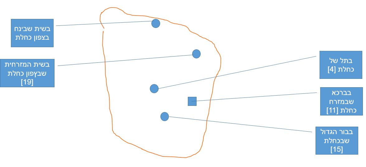 מפה אפשרית של תל כחלת